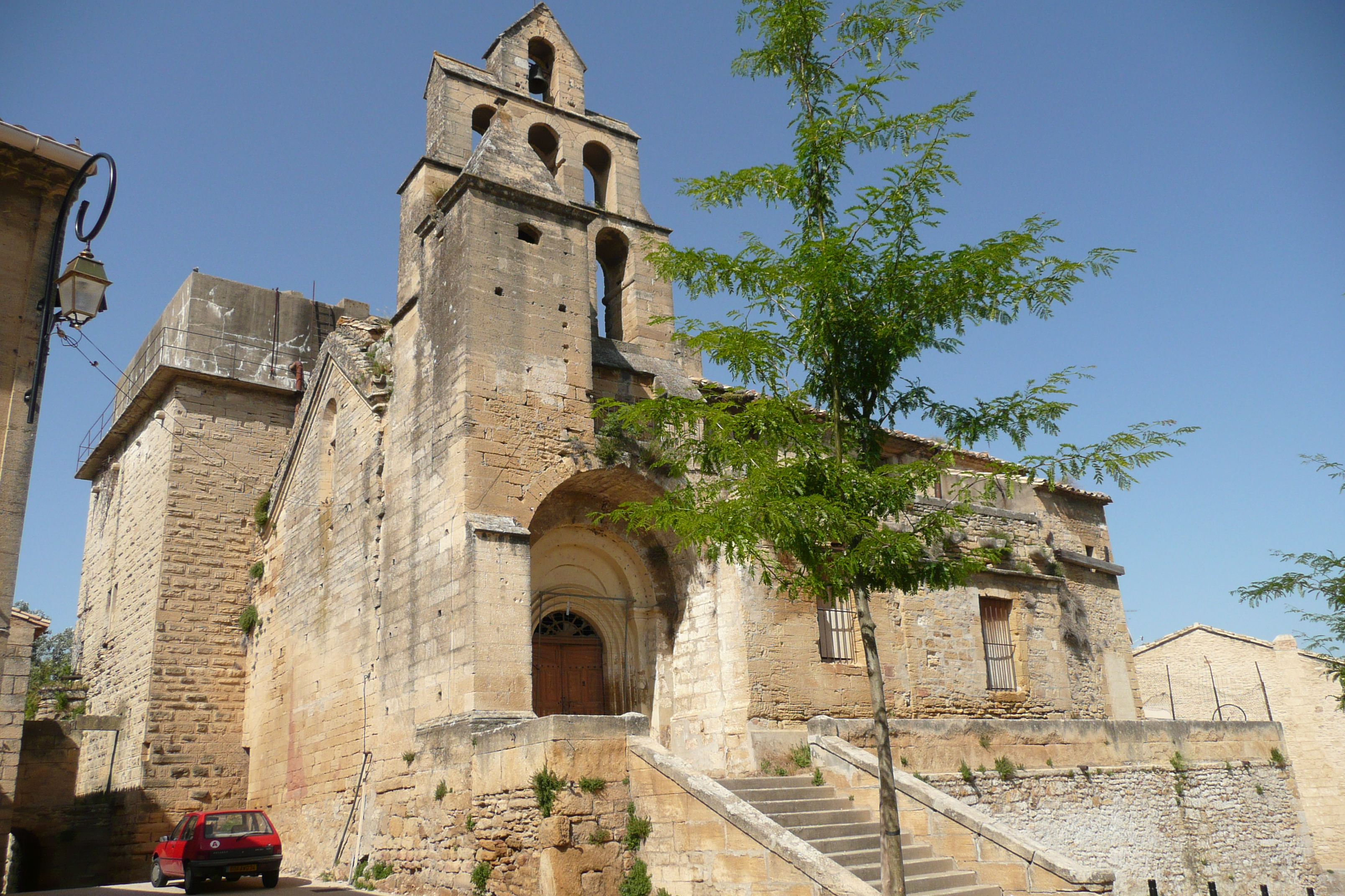 Eglise à Remoulins.